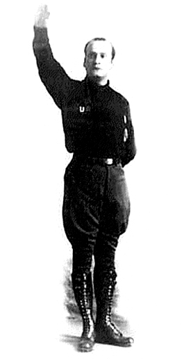 Luis A. Flores, abogado peruano, líder de la Unión Revolucionaria. Década de 1930.